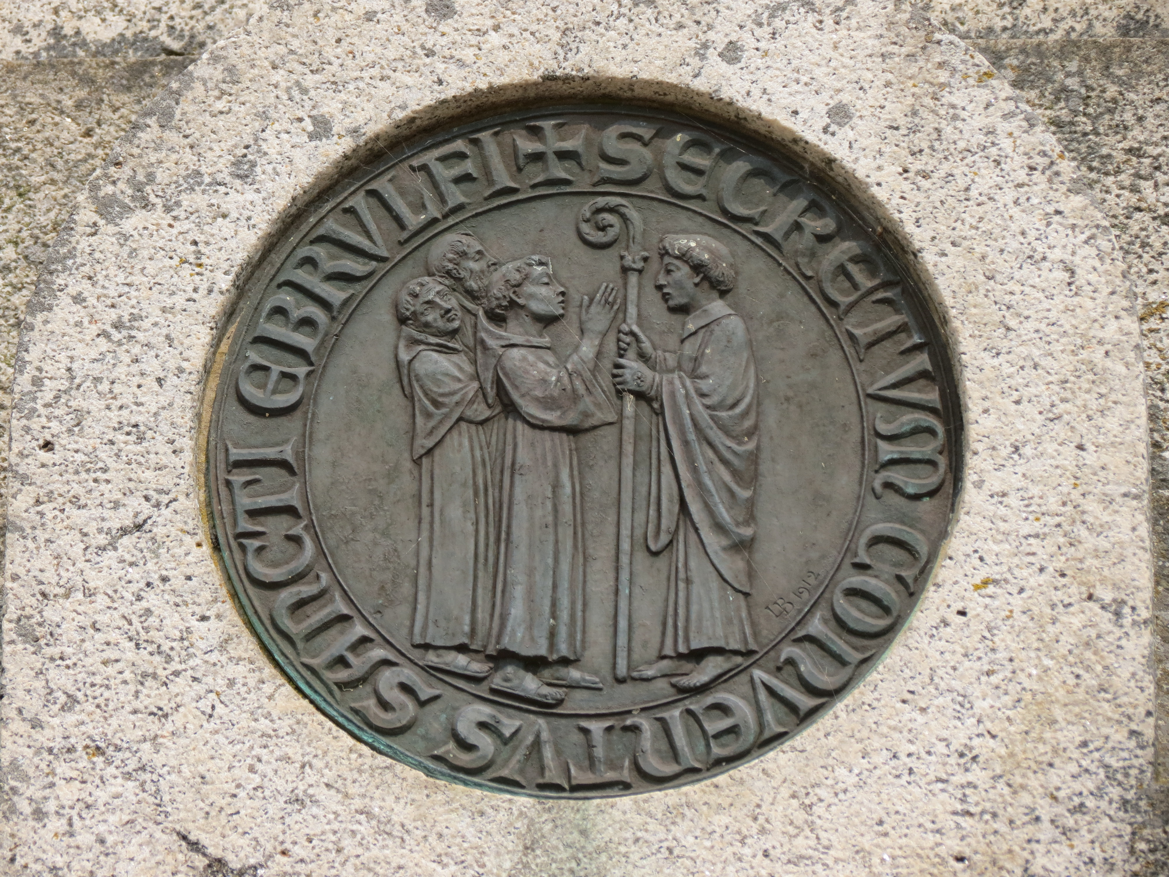 Médaillon du mémorial d'Orderic Vital.